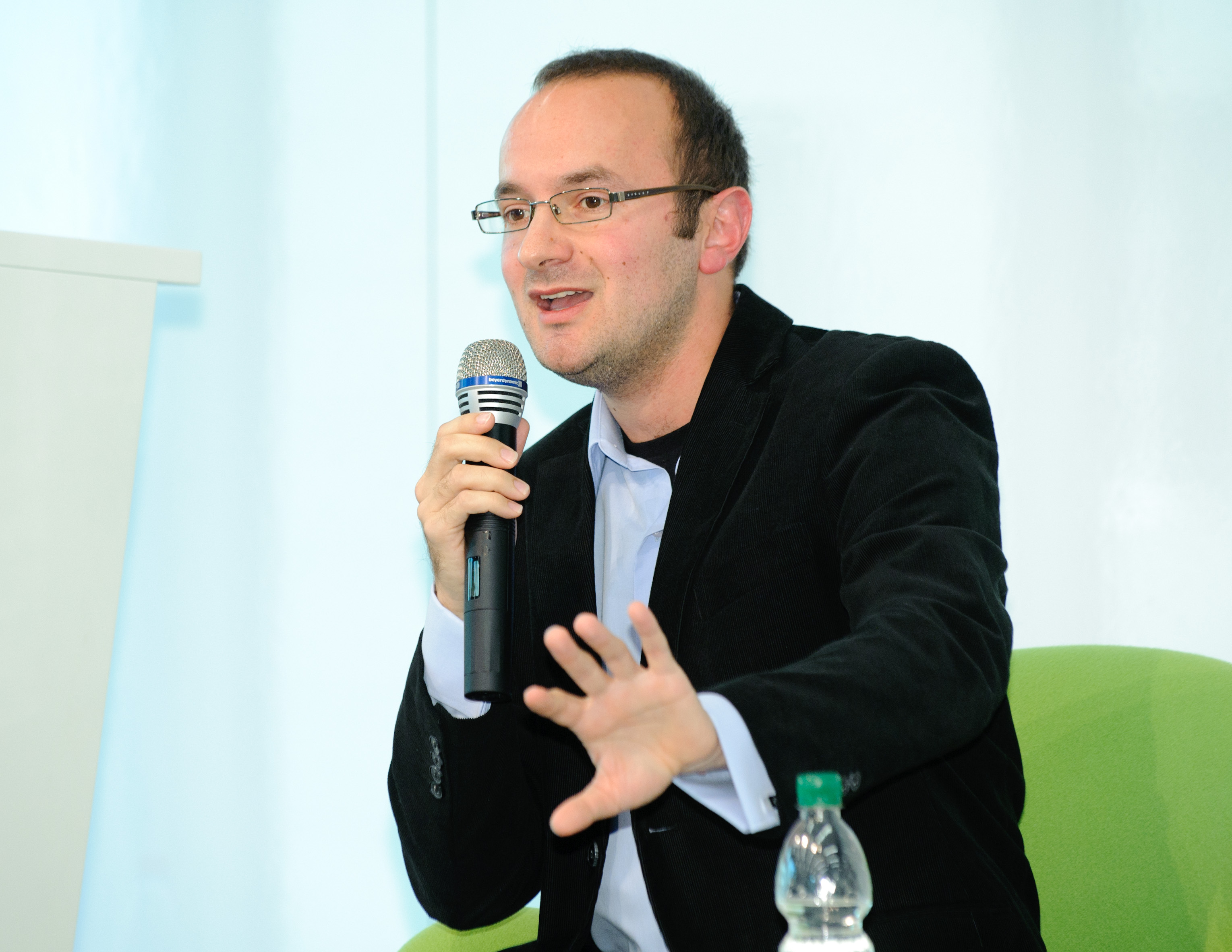 Vladimir Pavicevic (Politikwissenschaftler - Universität Belgrad) Foto: CC-BY-SA Stephan Röhl /